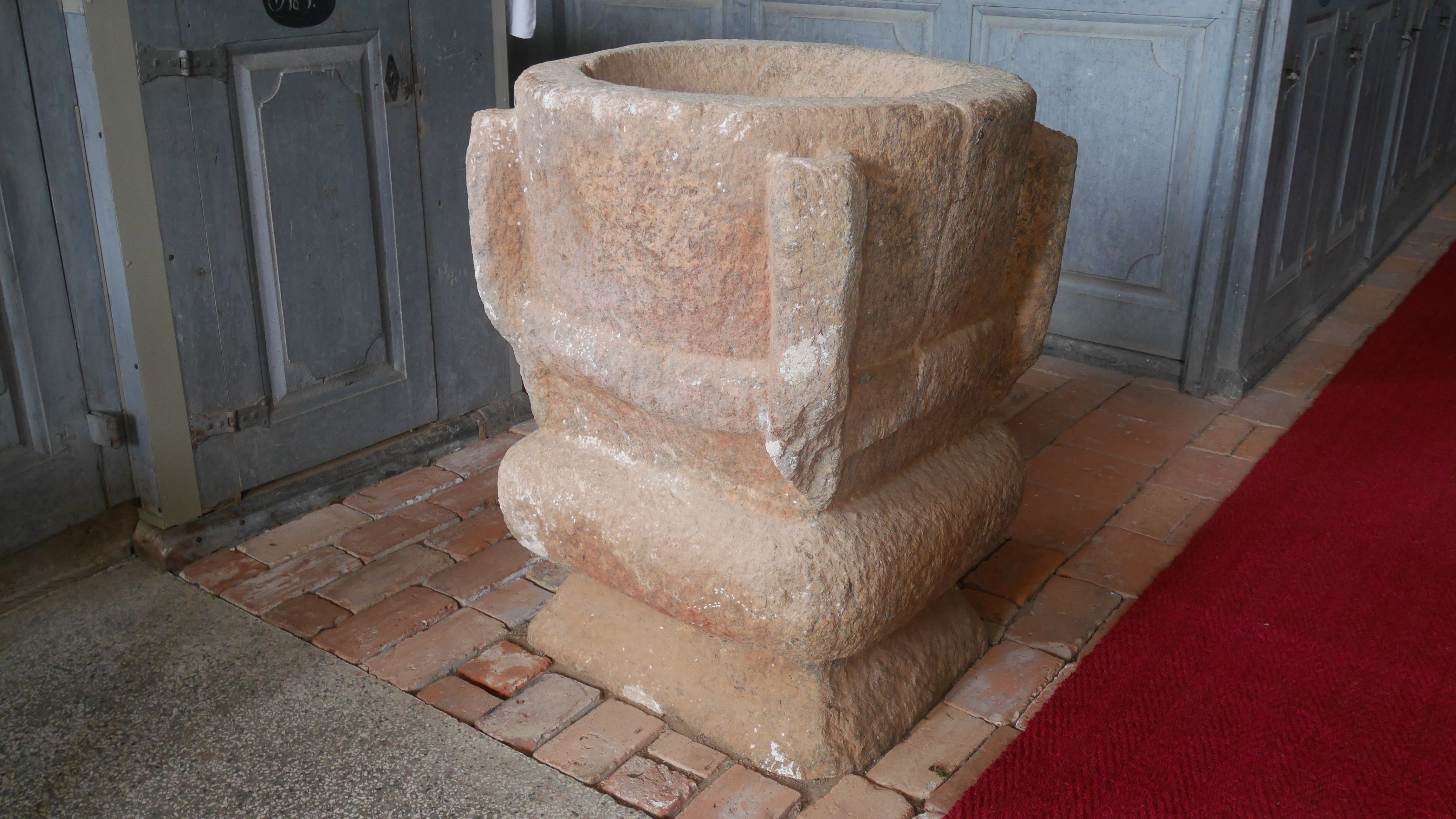 St.-Margarethen-Kirche (Patzig) roman. Taufstein